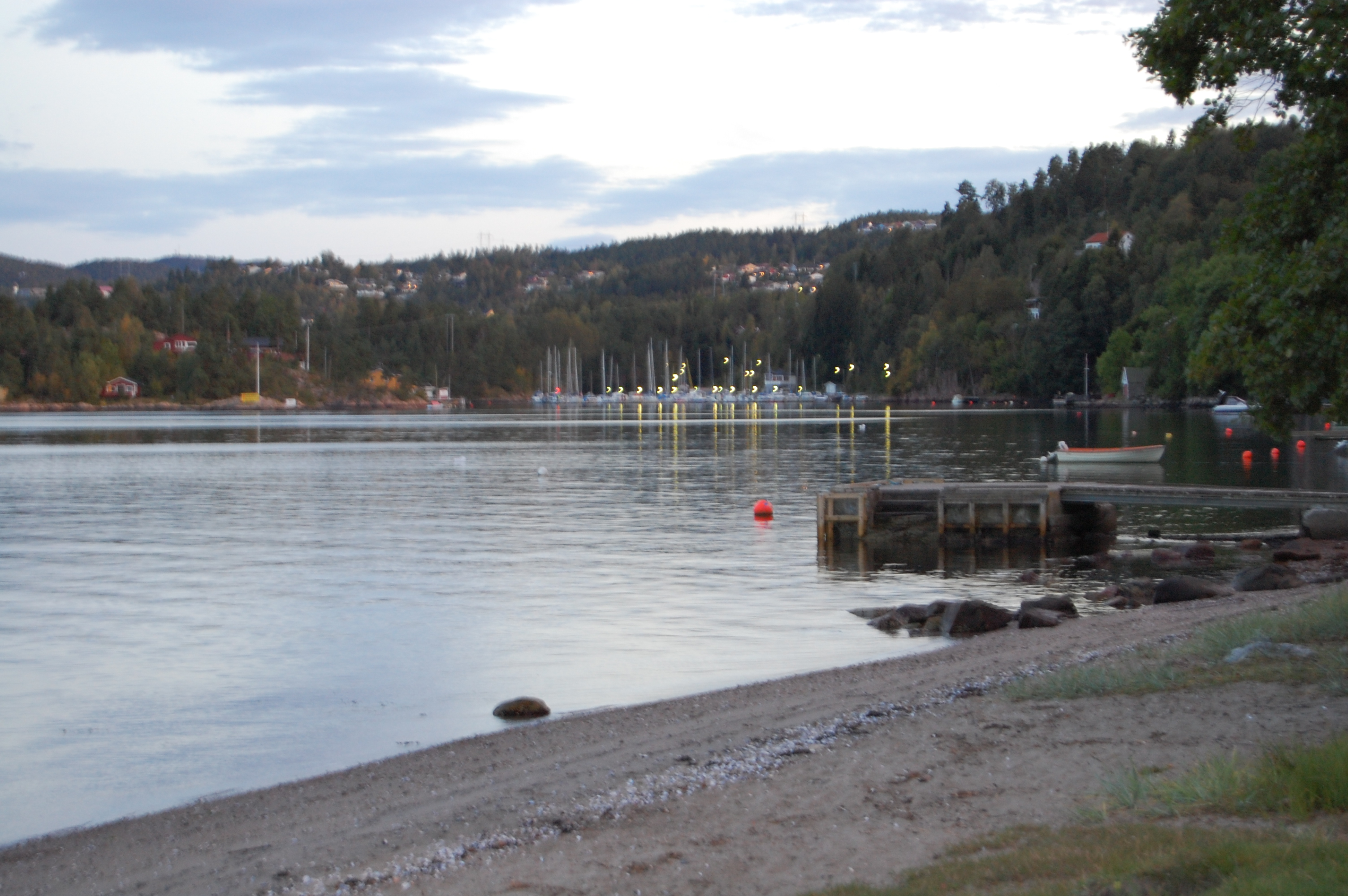 Årosstranda